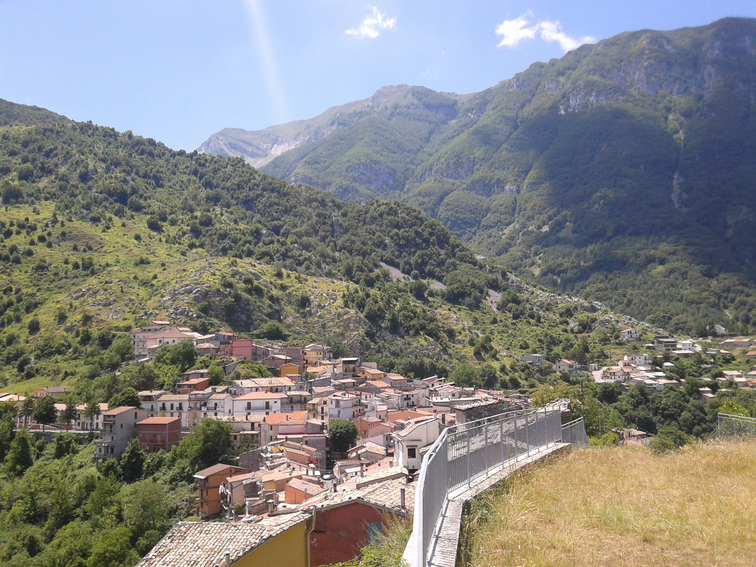 Foto panoramica di Rendinara